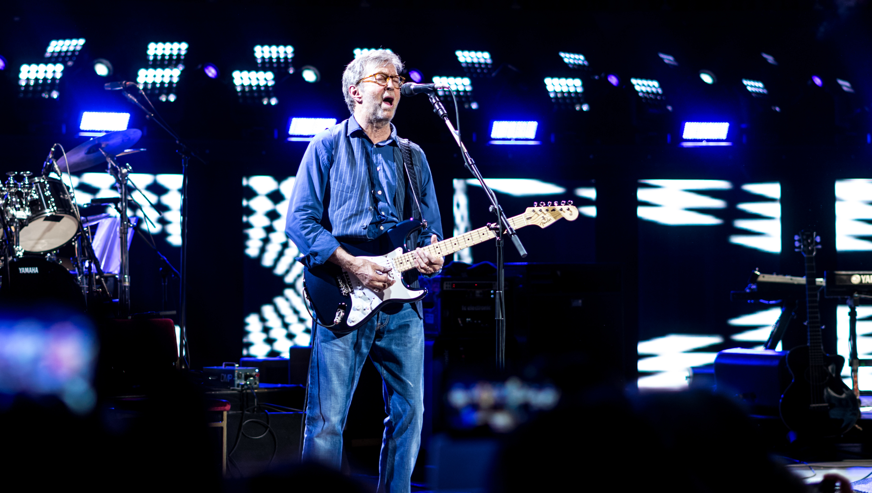 EricClaptonRAH240517-23